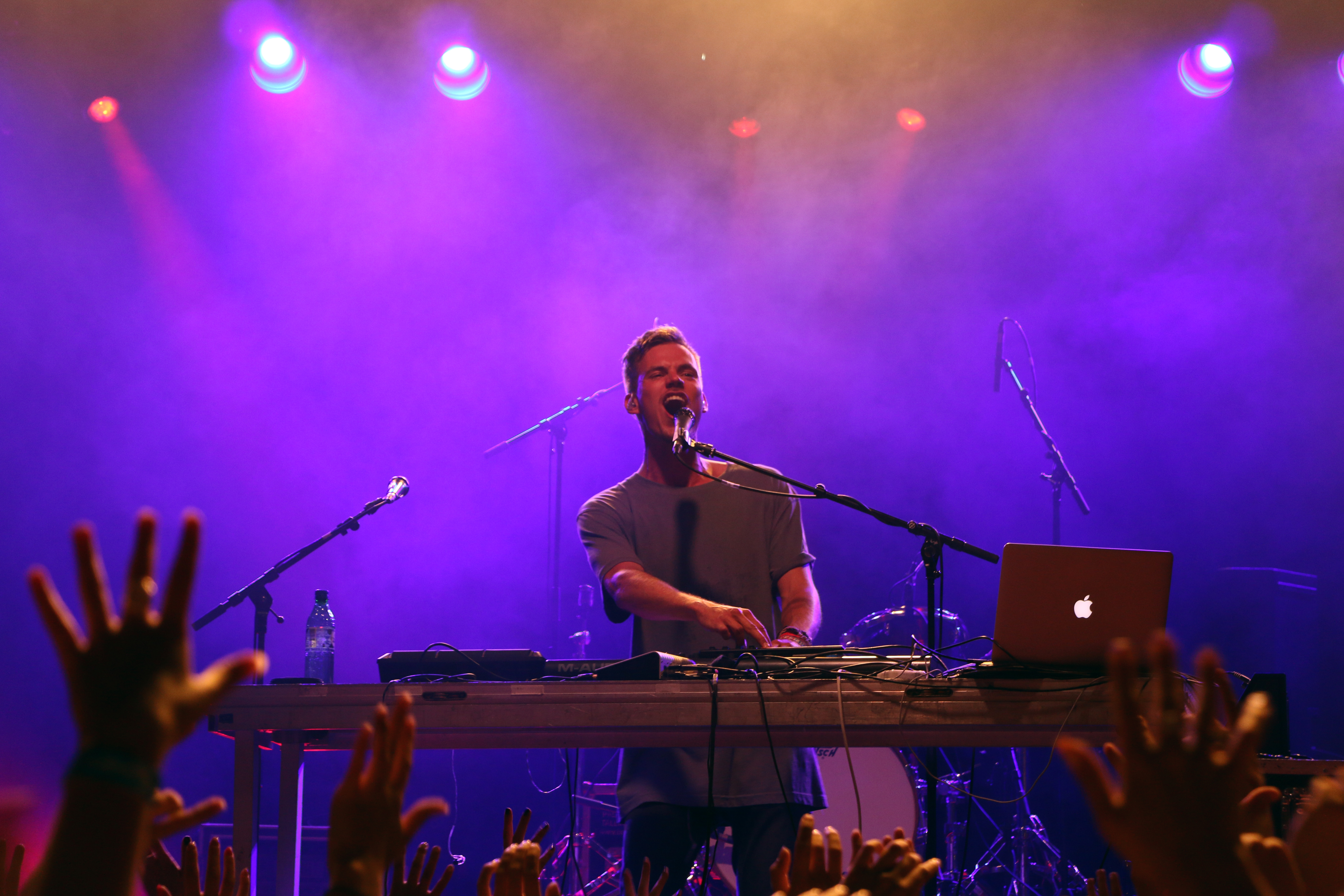 NOËP esinemas Intsikurmu muusikafestivalil 2016. aastal.